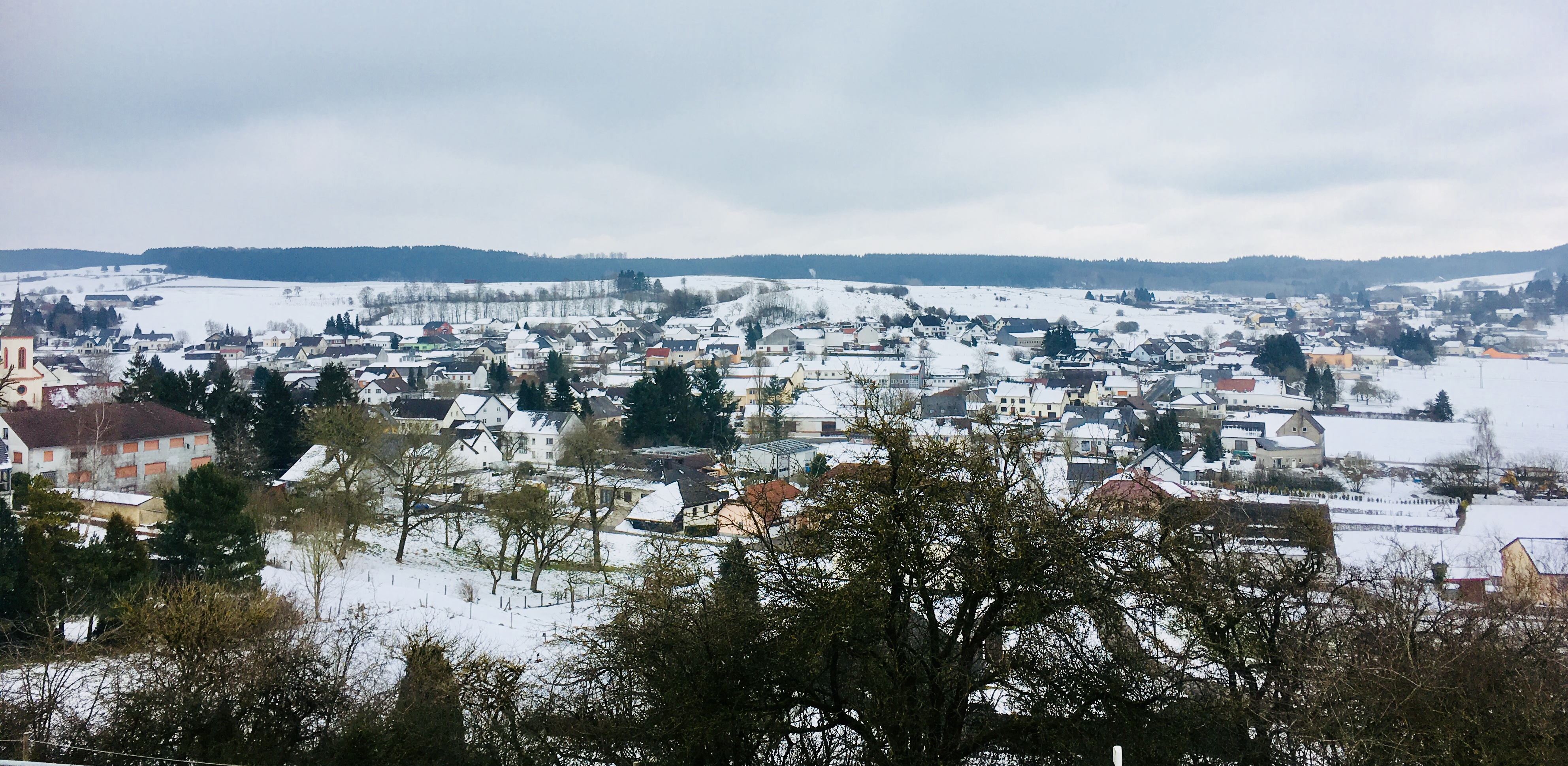 Blick vom Parkplatz an der L 30 auf den Dorfkern. Links Pfarrkirche St. Nikolaus. Rechts Siedlungskern Loch.